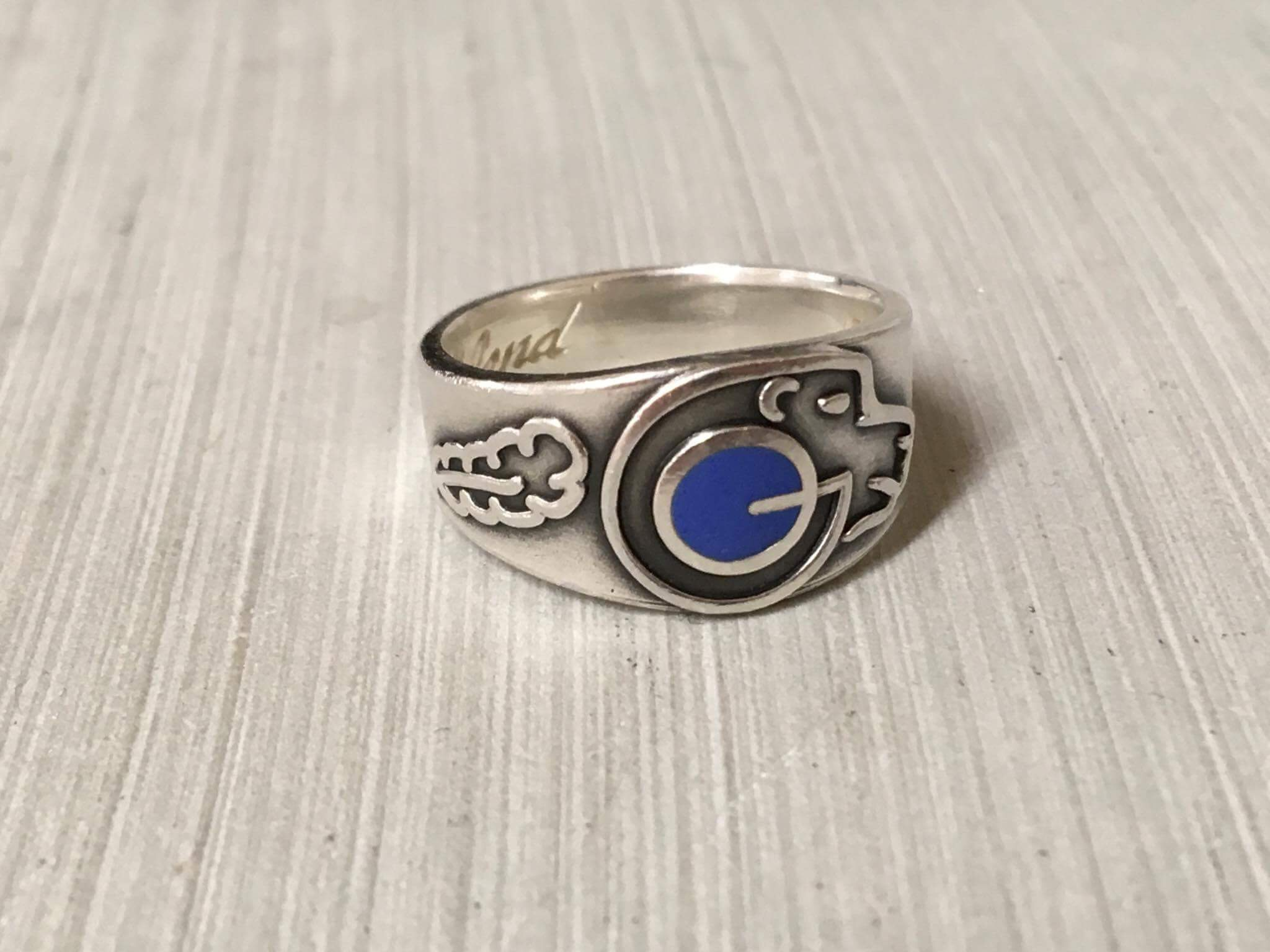 Otepää Gümnaasiumi koolisõrmus